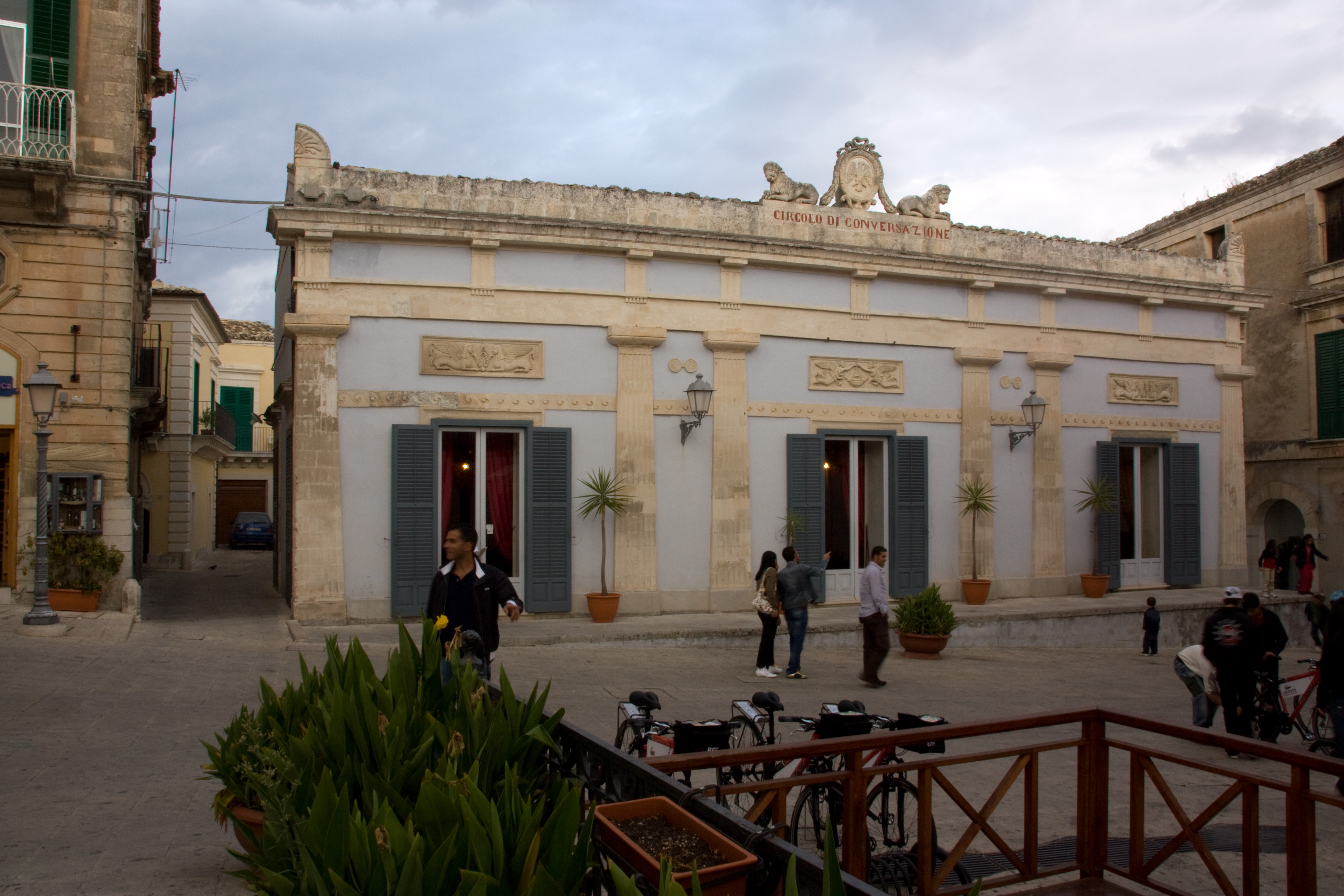 Circolo di Conversazione, Ragusa Ibla, Sicile, Italie